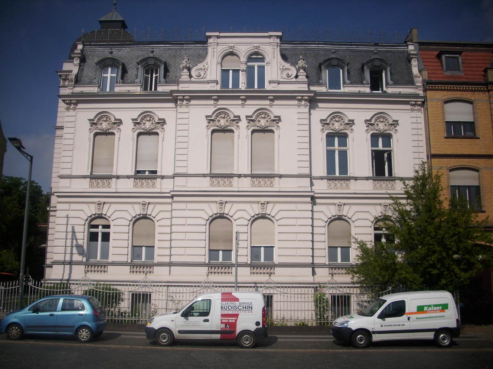 Denkmalgeschütztes villenartiges Wohnhaus Schillerstraße 55 in Cottbus.